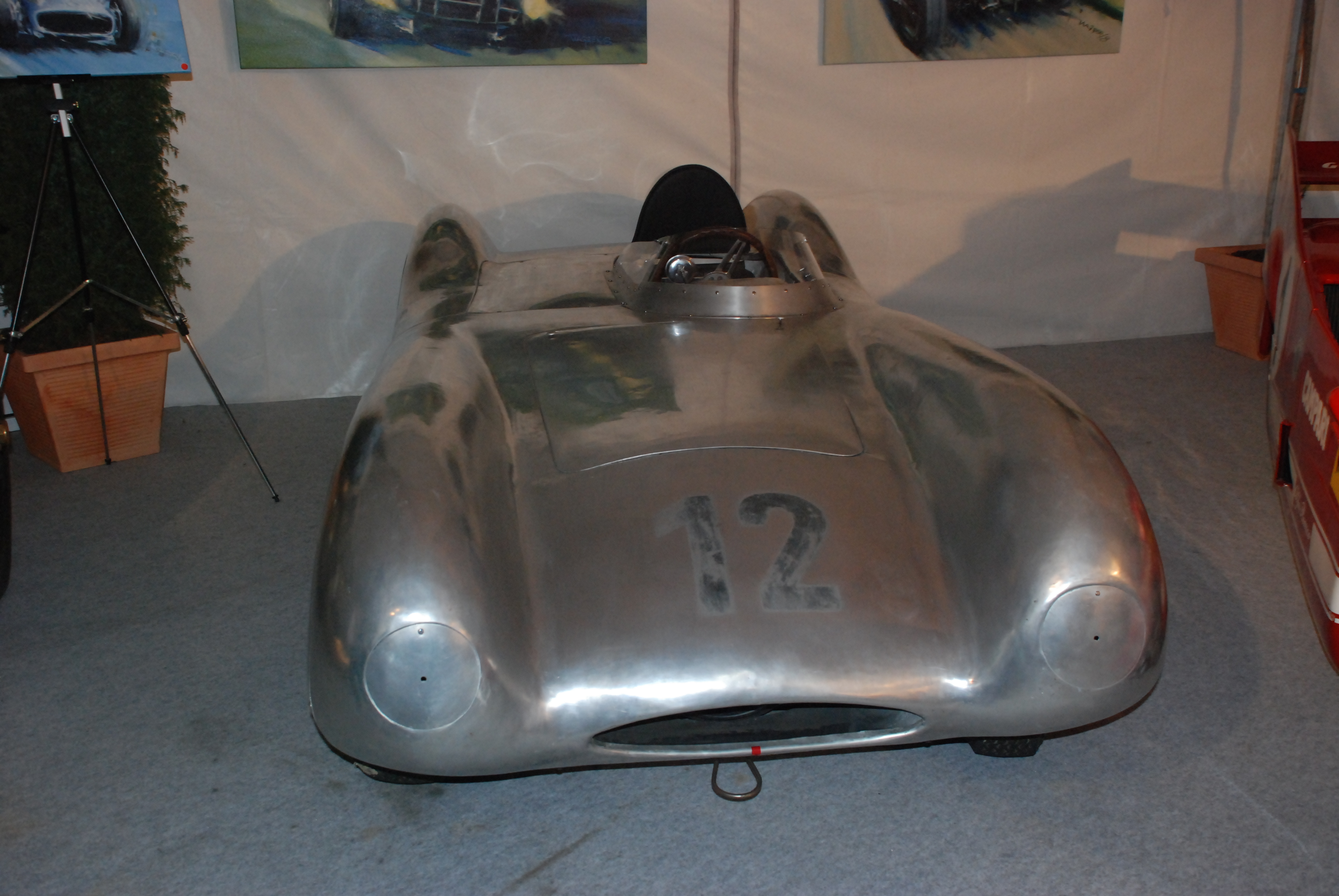 AWE 1500 RS